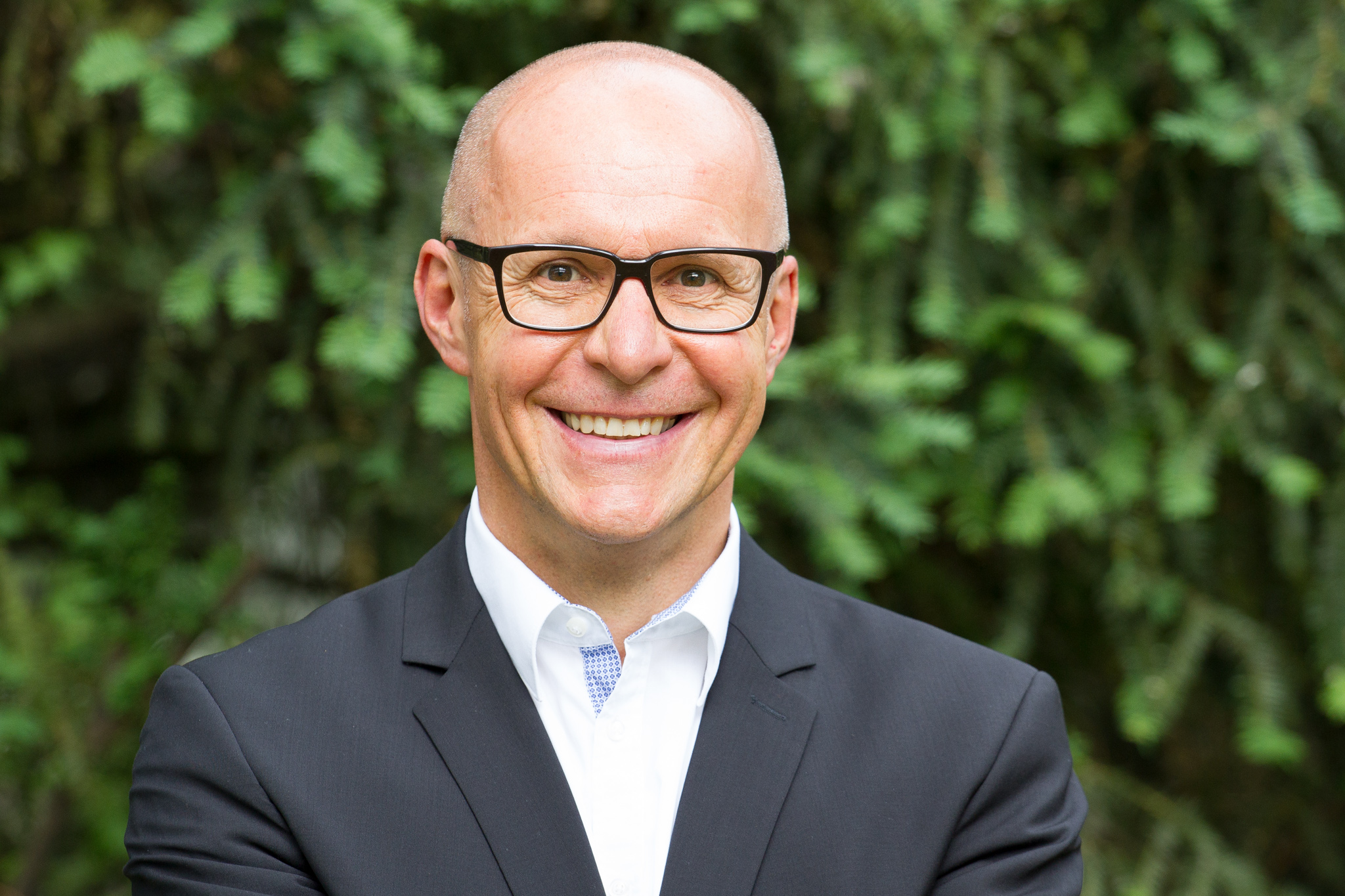 Jörg Schneider (* 1964) ist ein deutscher Wirtschaftsingenieur und Politiker (AfD). Er wurde bei der Bundestagswahl 2017 in den Deutschen Bundestag gewählt.